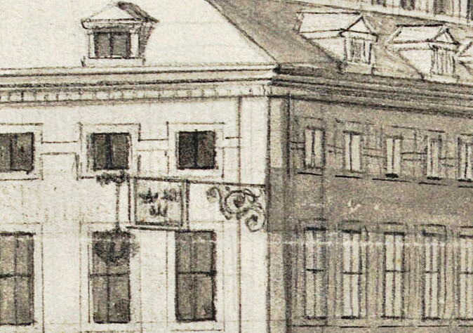 Värdshuset Tre Koronor i Kvarteret Proserpina, sedermera Bankokällaren vid Järntorget, del av Erik Dahlberghs illustration över Södra Bankohuset 1691.